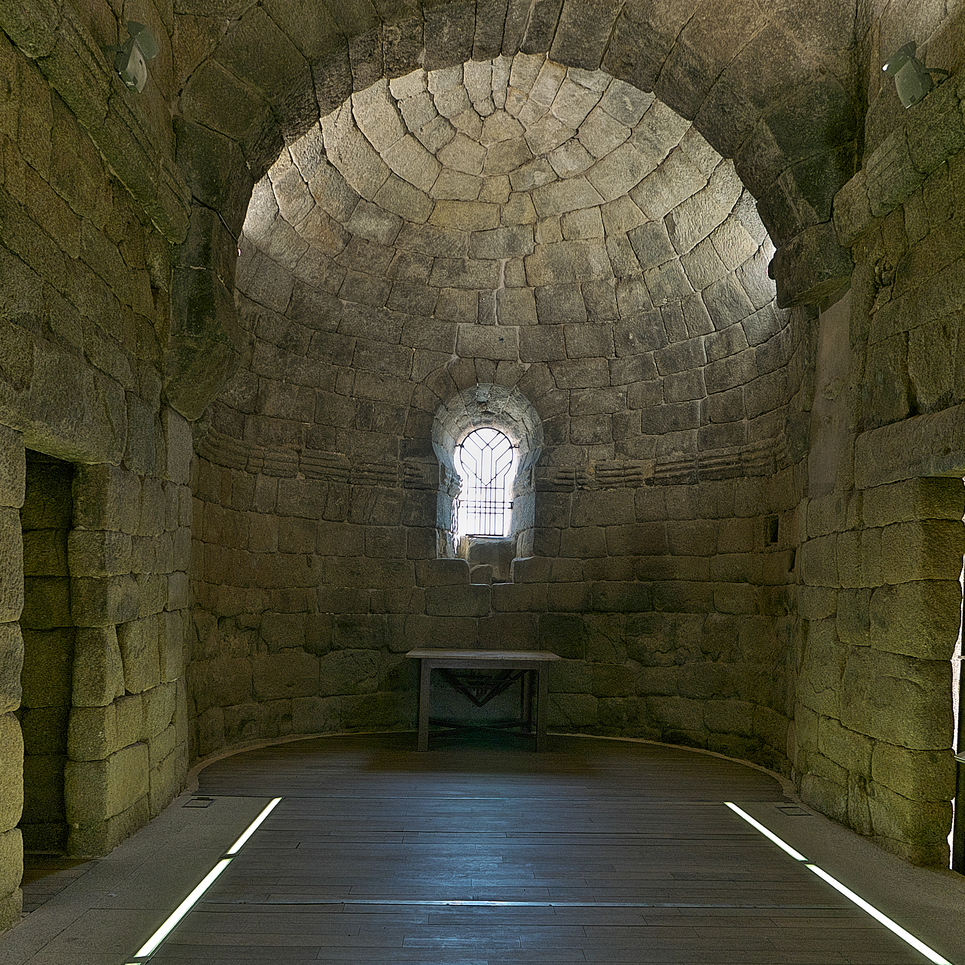 El abovedamiento y el arco de herradura en el presbiterio de la iglesia.